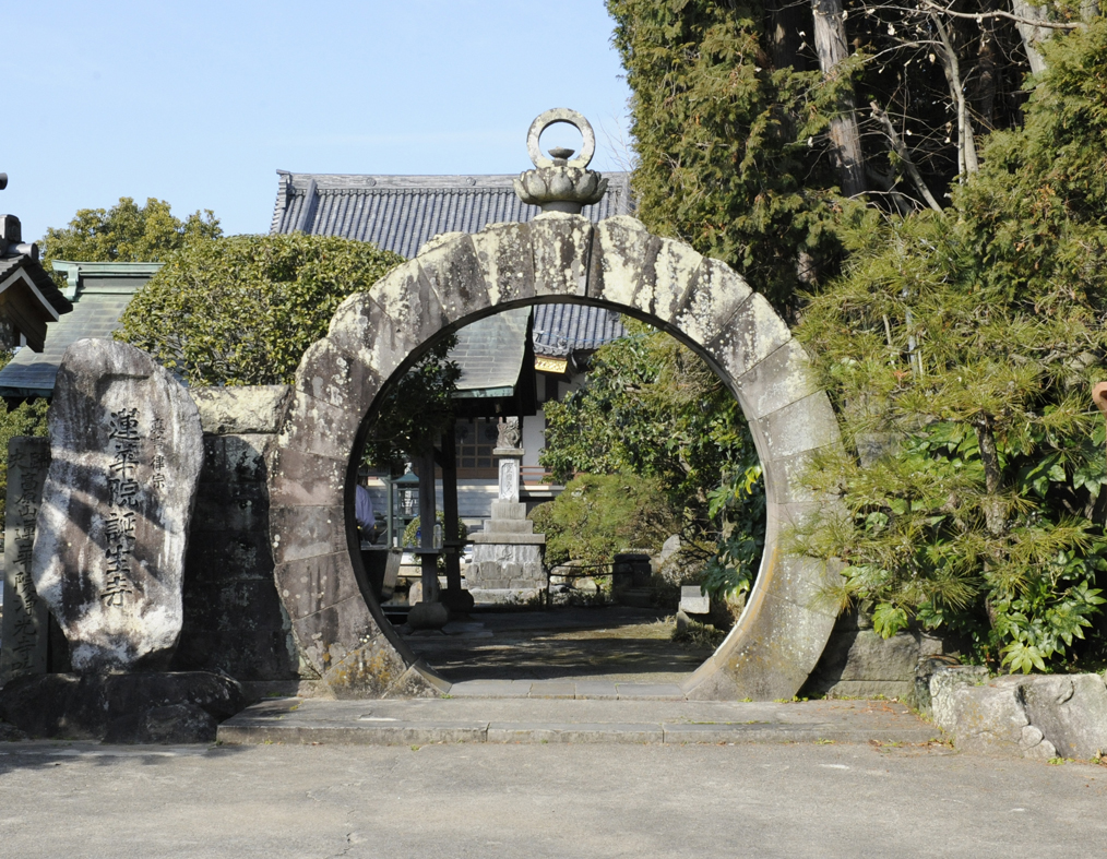 円門（蓮華門）